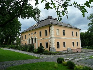 Jarnołtówek - Zameczek - prywatna posiadłość.